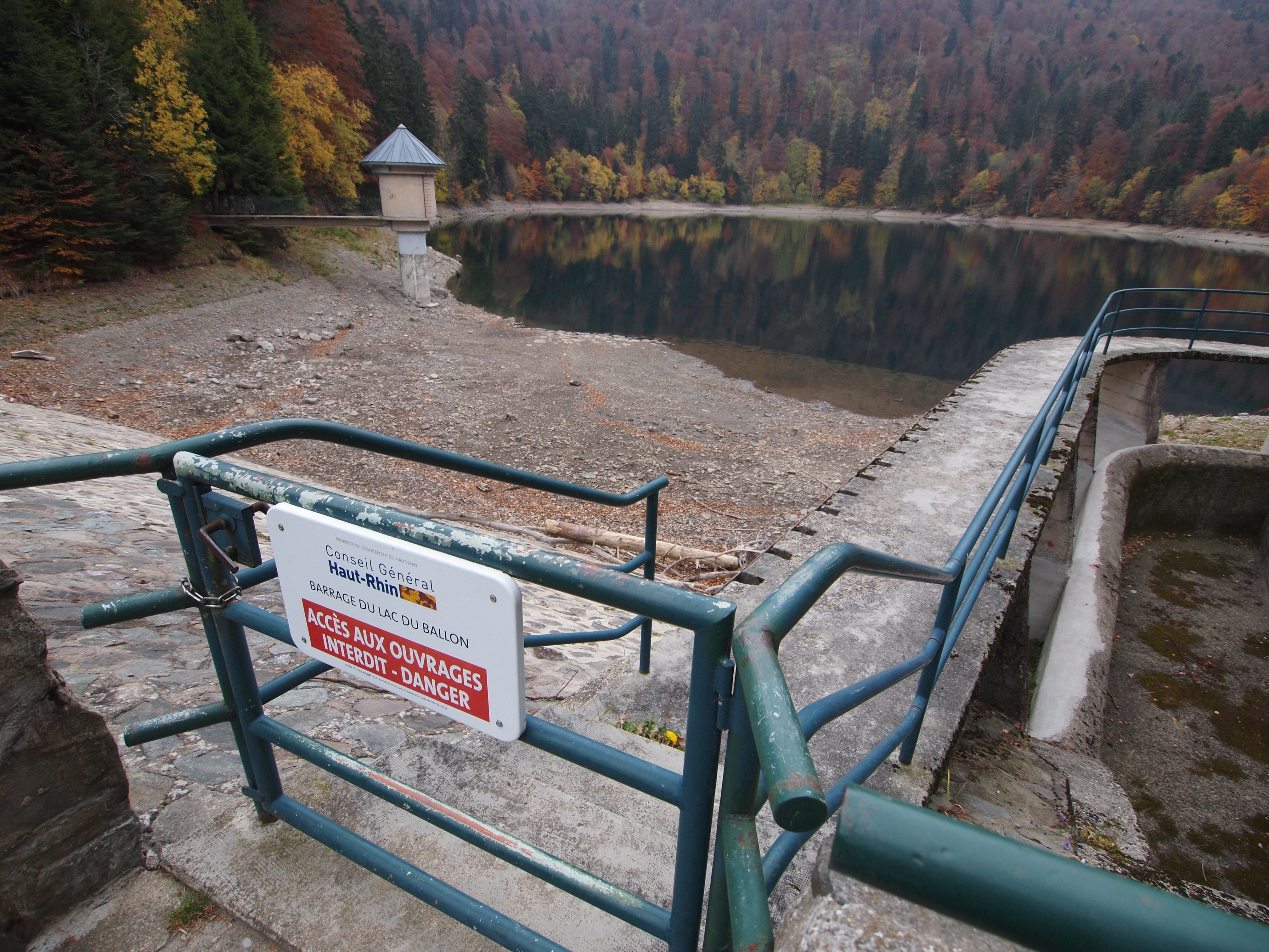 Lac du Ballon